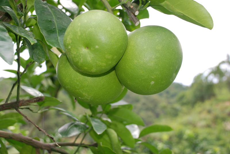 中文（中国大陆）: 柚子产地平和县树上将近成熟的柚子